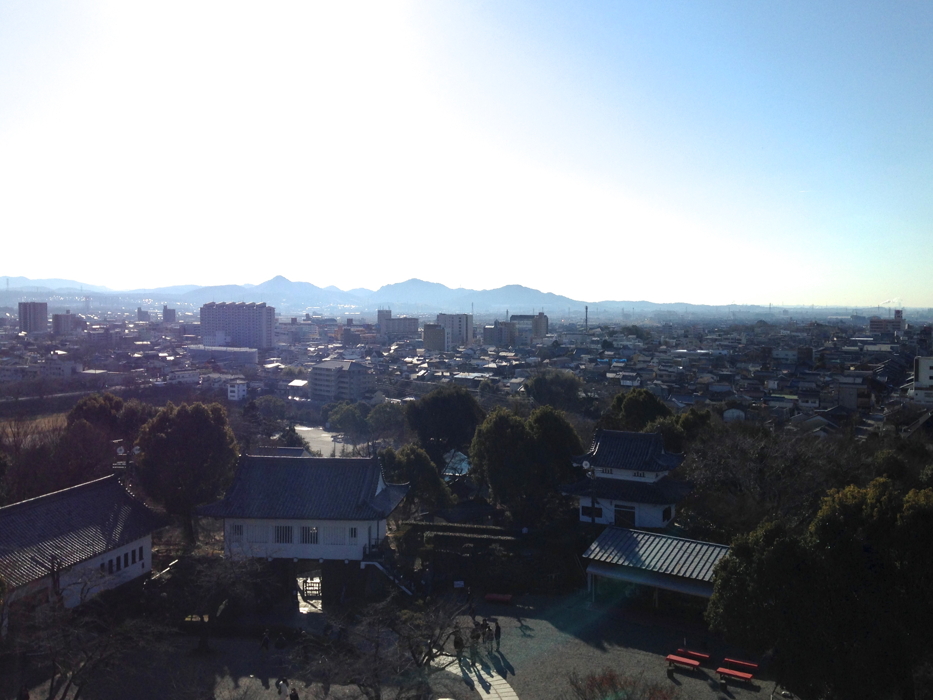 犬山城天守閣より望む尾張富士・明治村方面